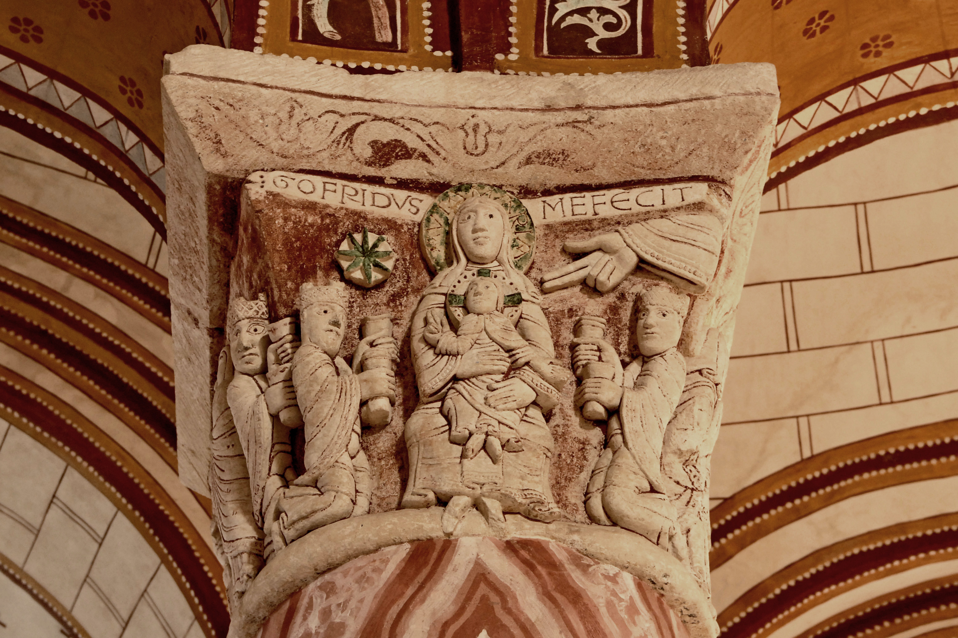 Kapitell IV